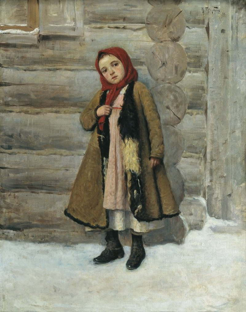 «Крестьянская девочка». 1899. Холст, масло. 89 x 69.5 см. Государственная Третьяковская галерея